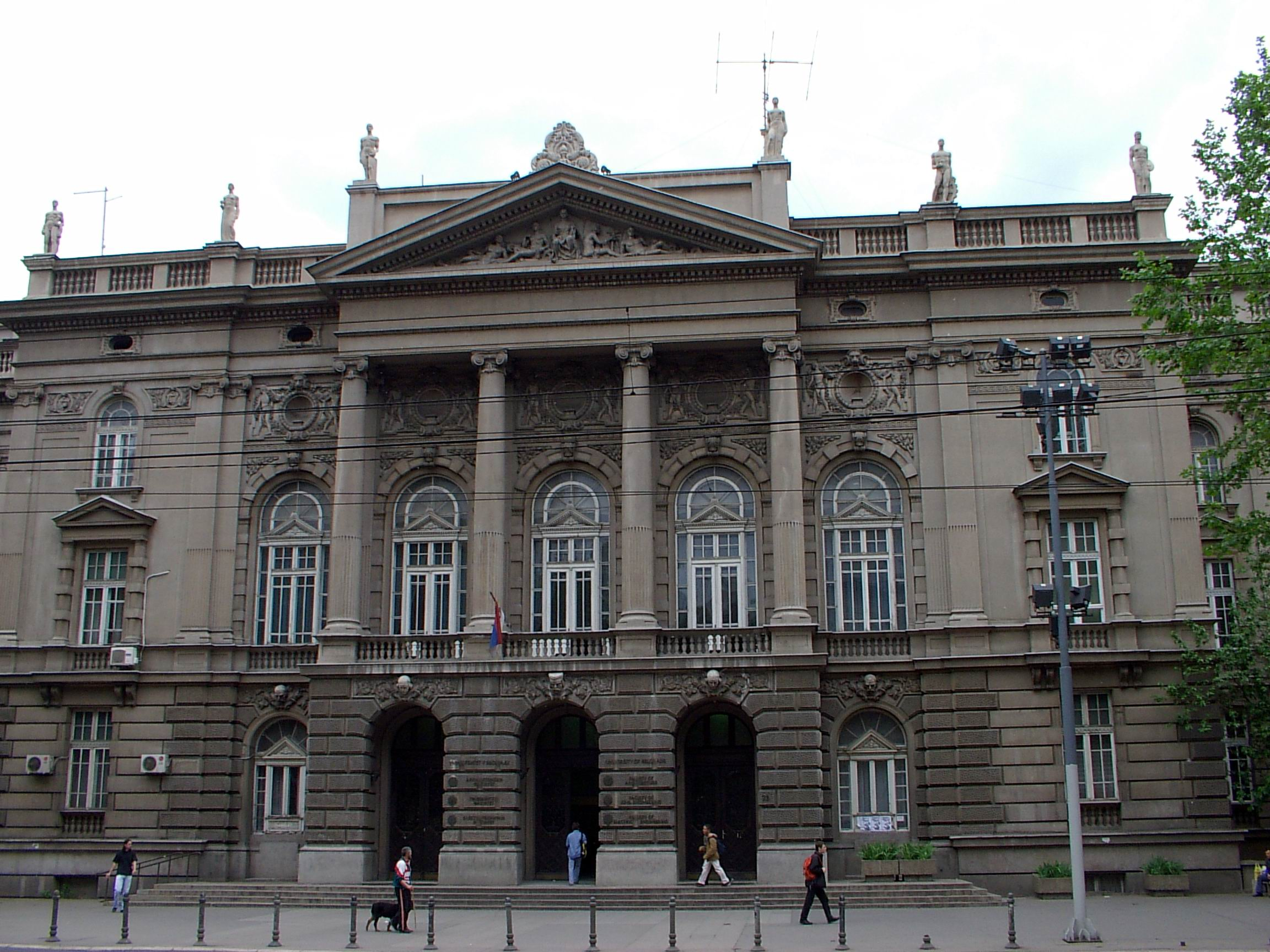 no original description